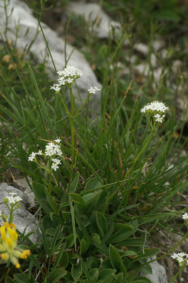 Skalna špajka na Veliki planini.